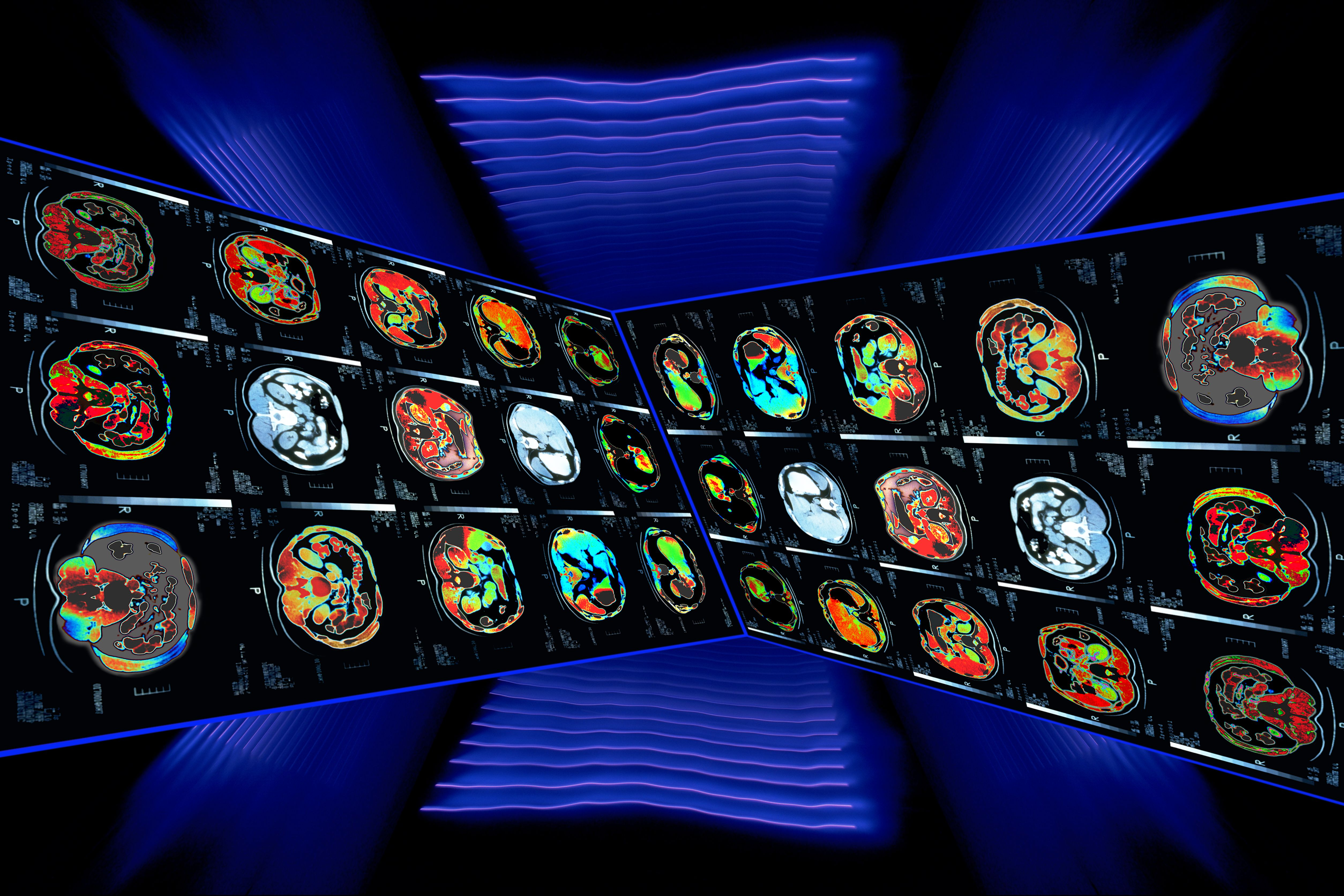 Em 1996, tomei contraste para uma tomografia. O lado bom deste momento foi fazer uma imagem abstrata do interior de meu abdomem que posteriormente foi manipulada digitalmente